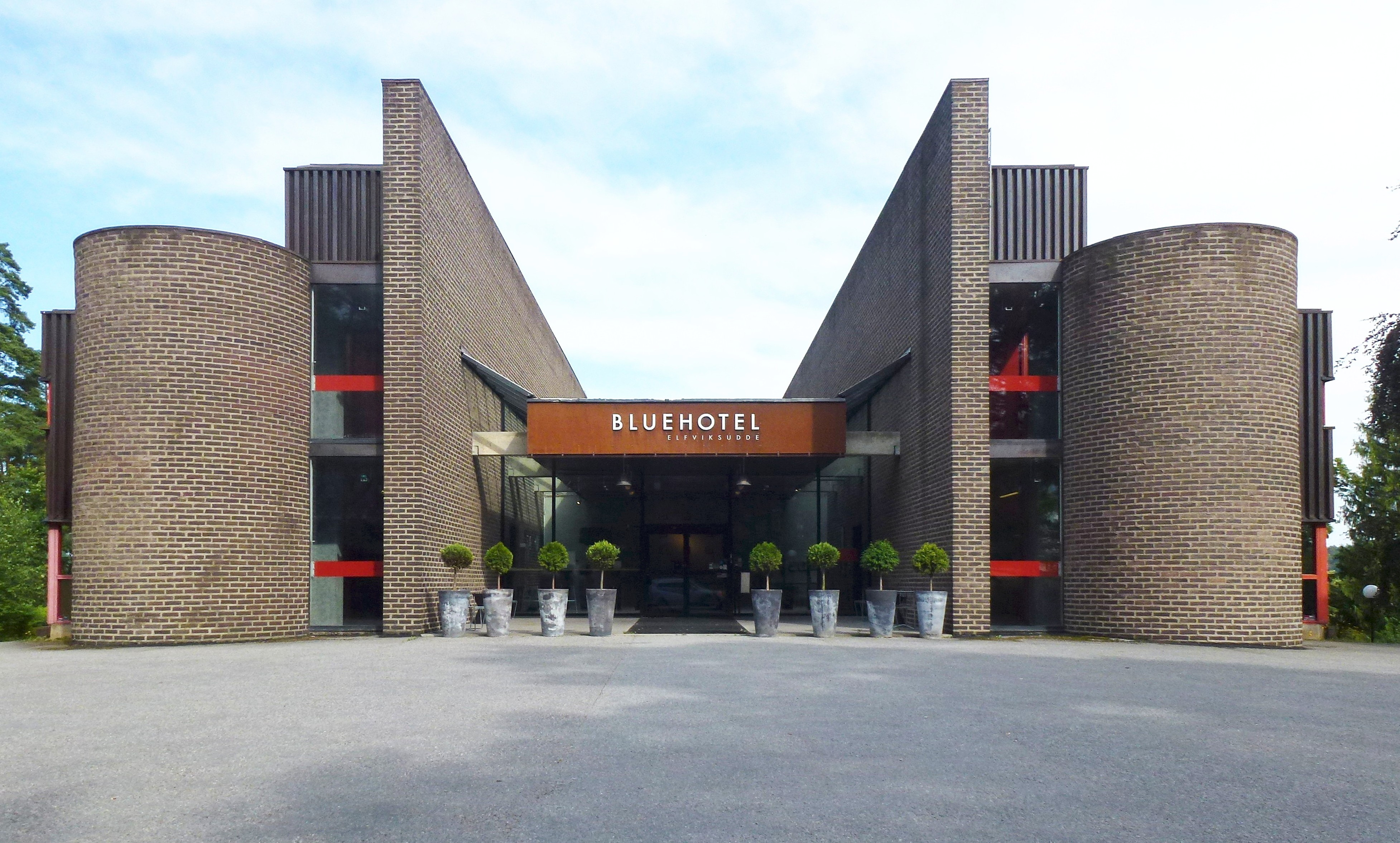 Blue Hotel Elvsviksudde